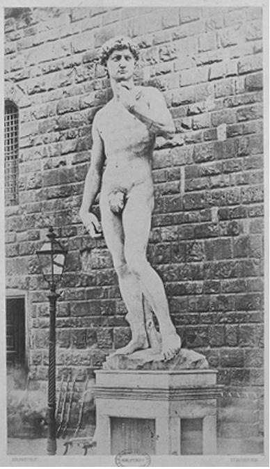 Le David de Michel-Ange photographié par Eugène Piot : il s'agit d'un positif sur papier salé destiné à l'album L'Italie monumentale publié en 1852-1853 à Paris. Légende : Florence/ David- Statue colossale de Michel Ange Buonarotti au palais vieux. Dim. : 32,40 sur 19 cm.